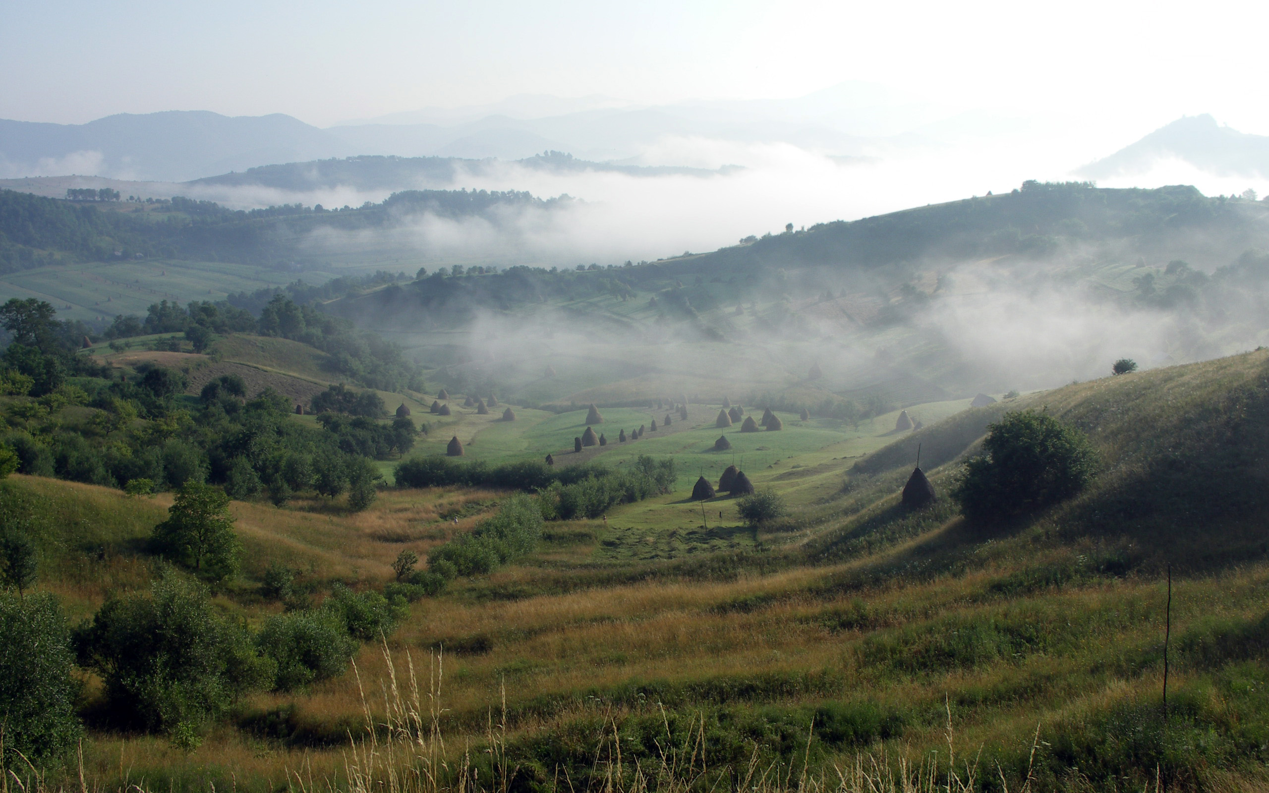 Zori în Văleni, Maramureş pe deal spre Călineşti privind peste Valea Izei